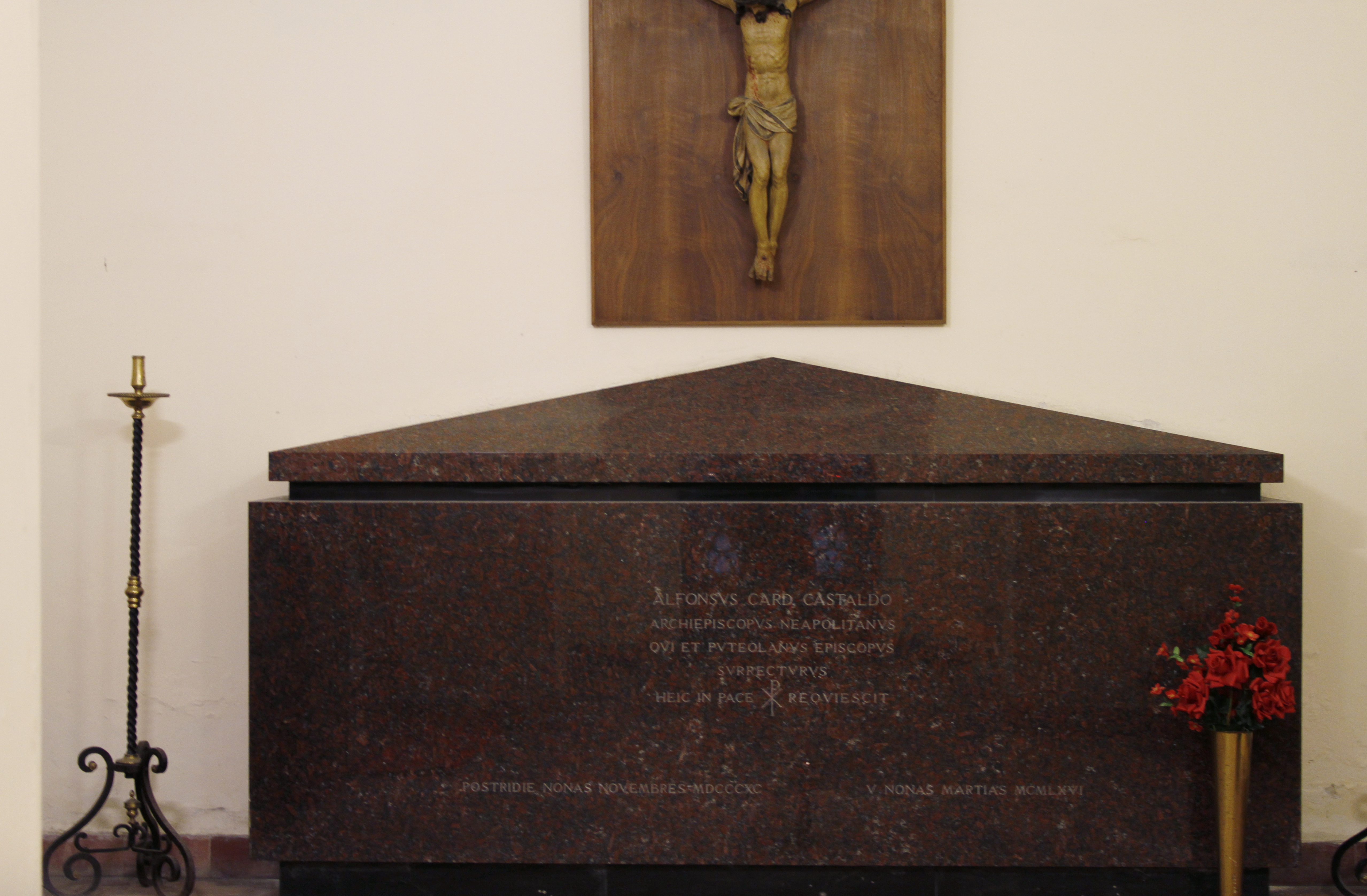 Cappella del Succorpo, Catedral de Nápoles